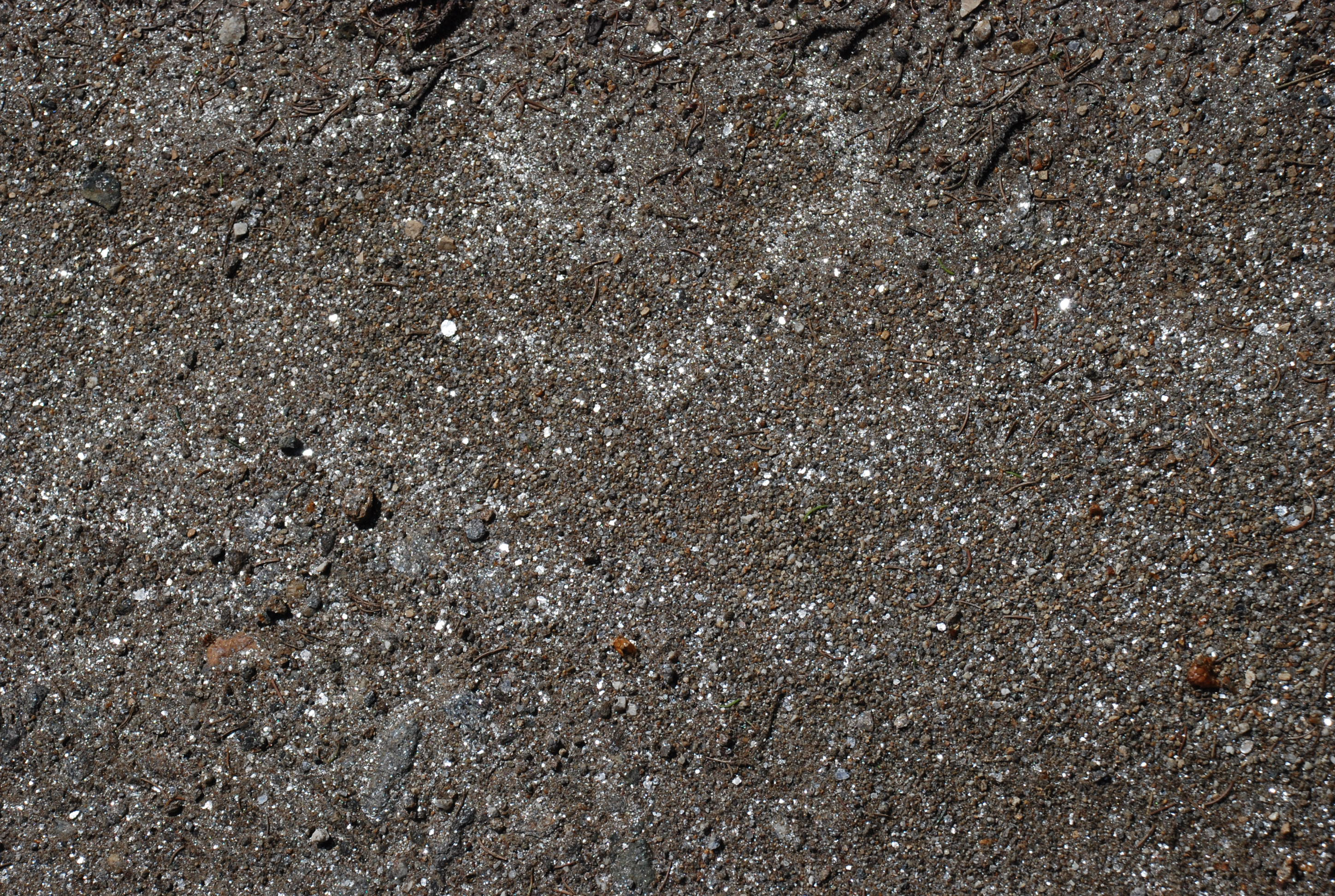 Straßenstück mit Glimmerplättchen (nach Regen, unbearbeitet)